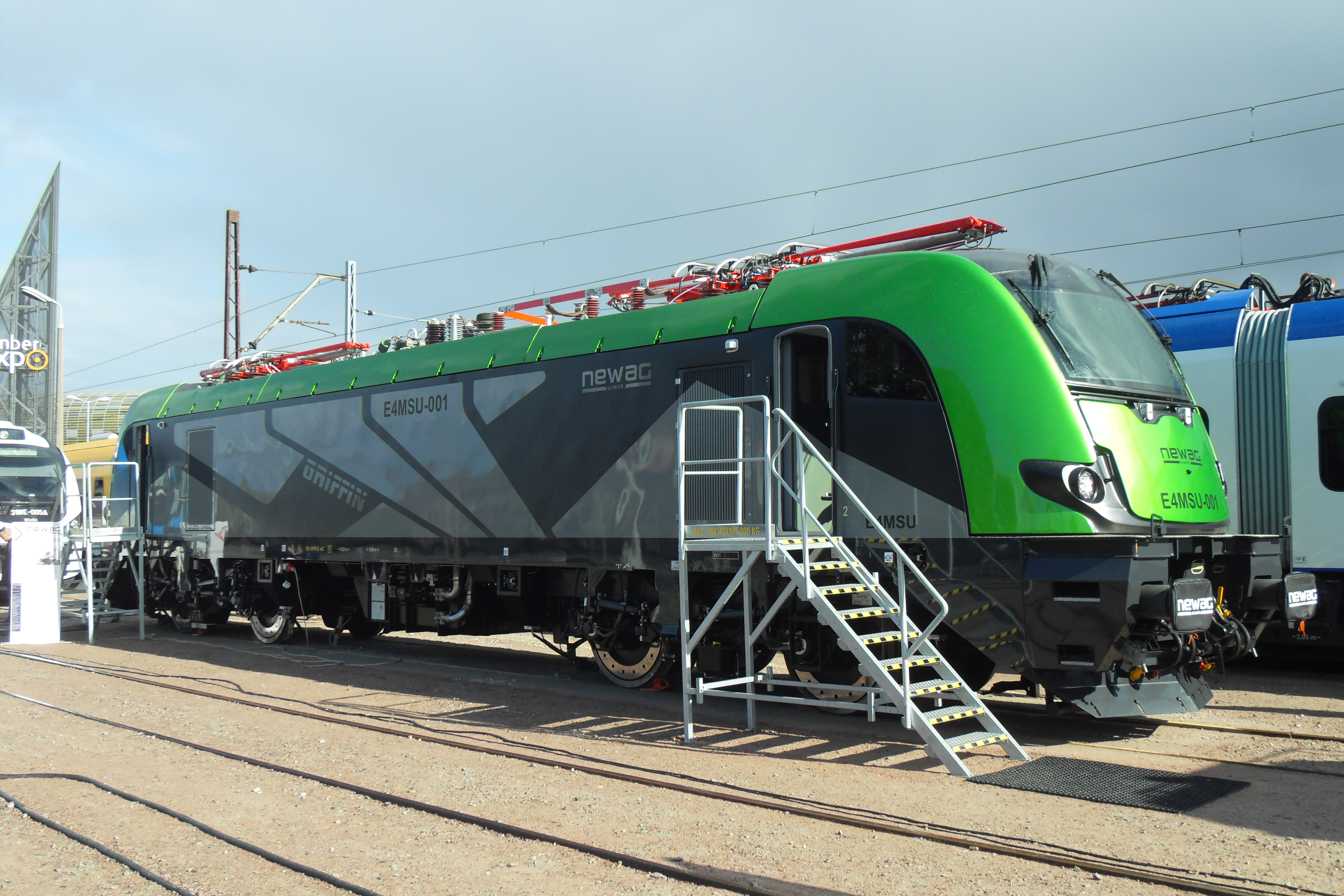 Gdańsk Letnica. TRAKO 2013, lokomotywa Newag E4MSU-001.